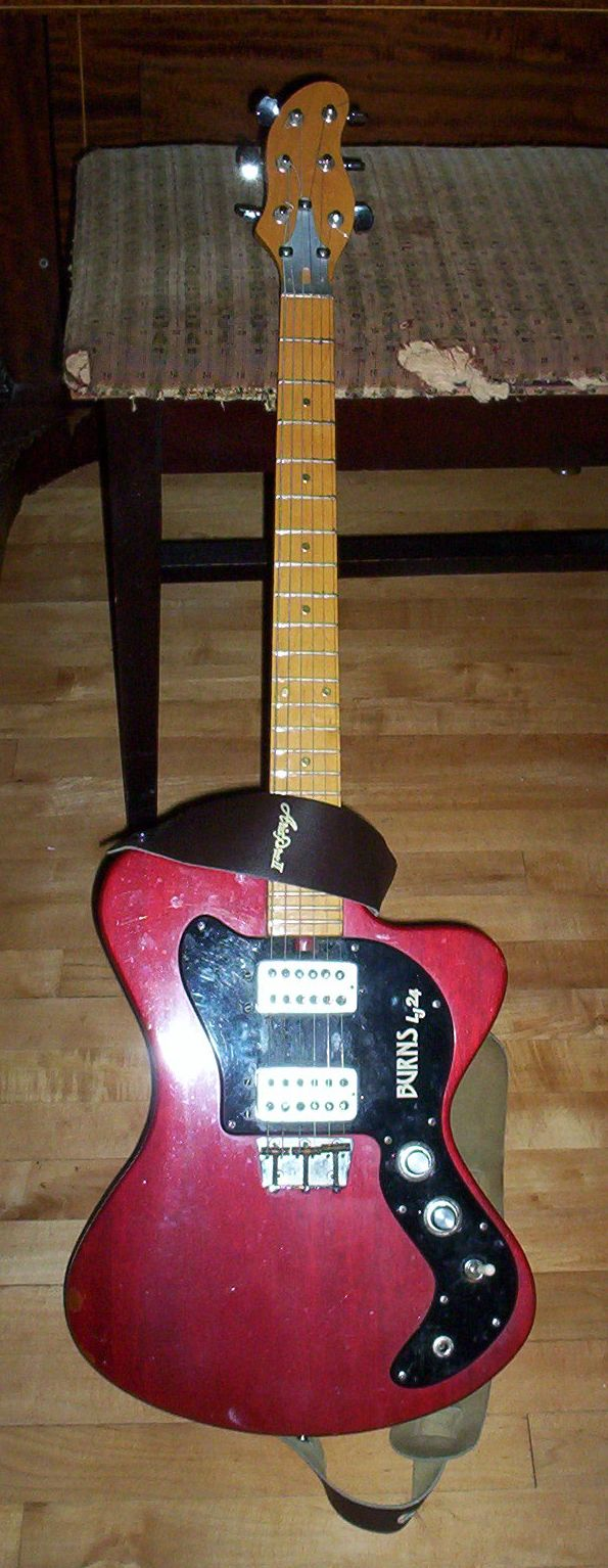 Burns UK LJ24 guitar